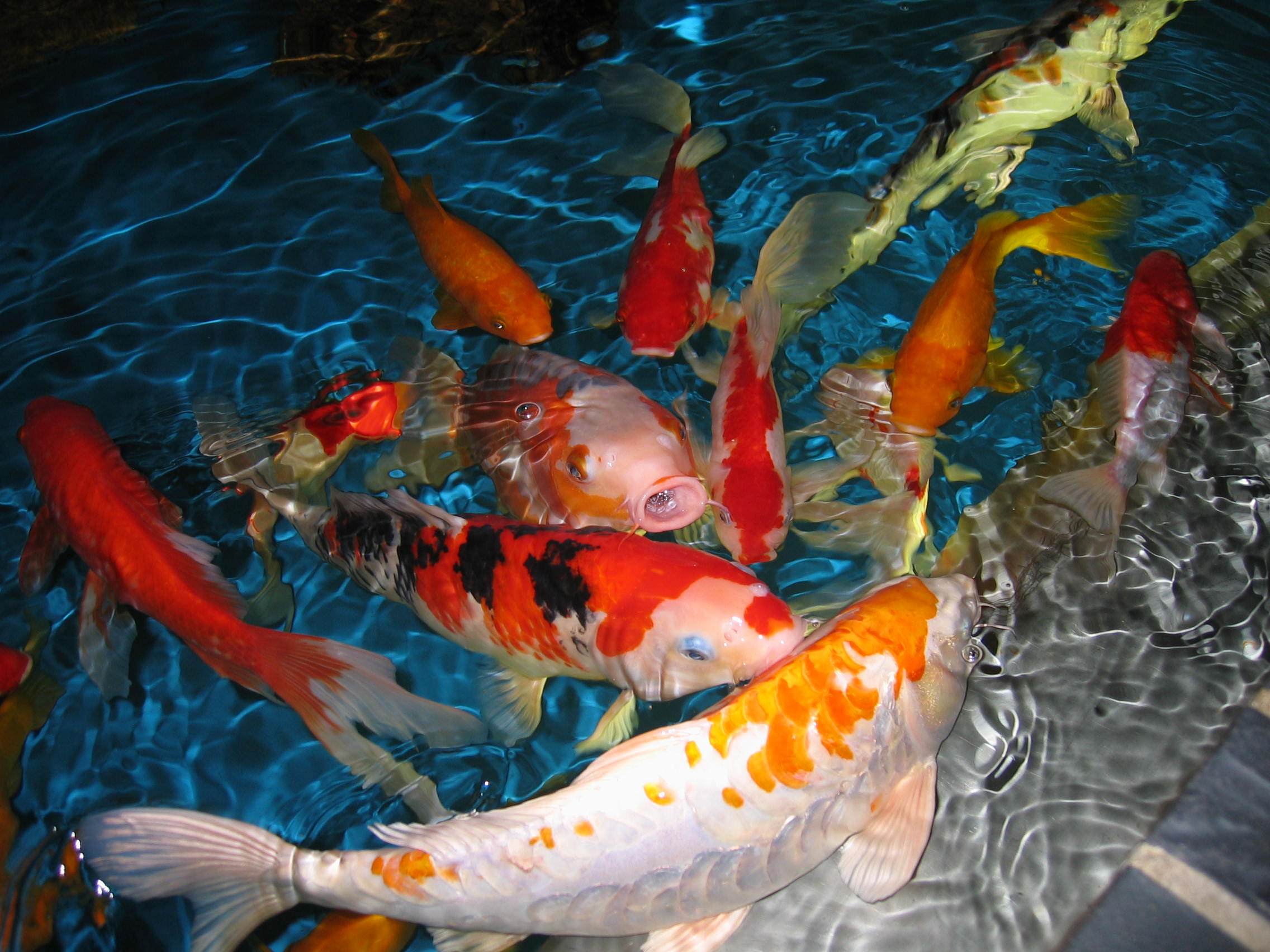 Koi´s im Becken des Aquariums vom Zoologischen Garten Berlin